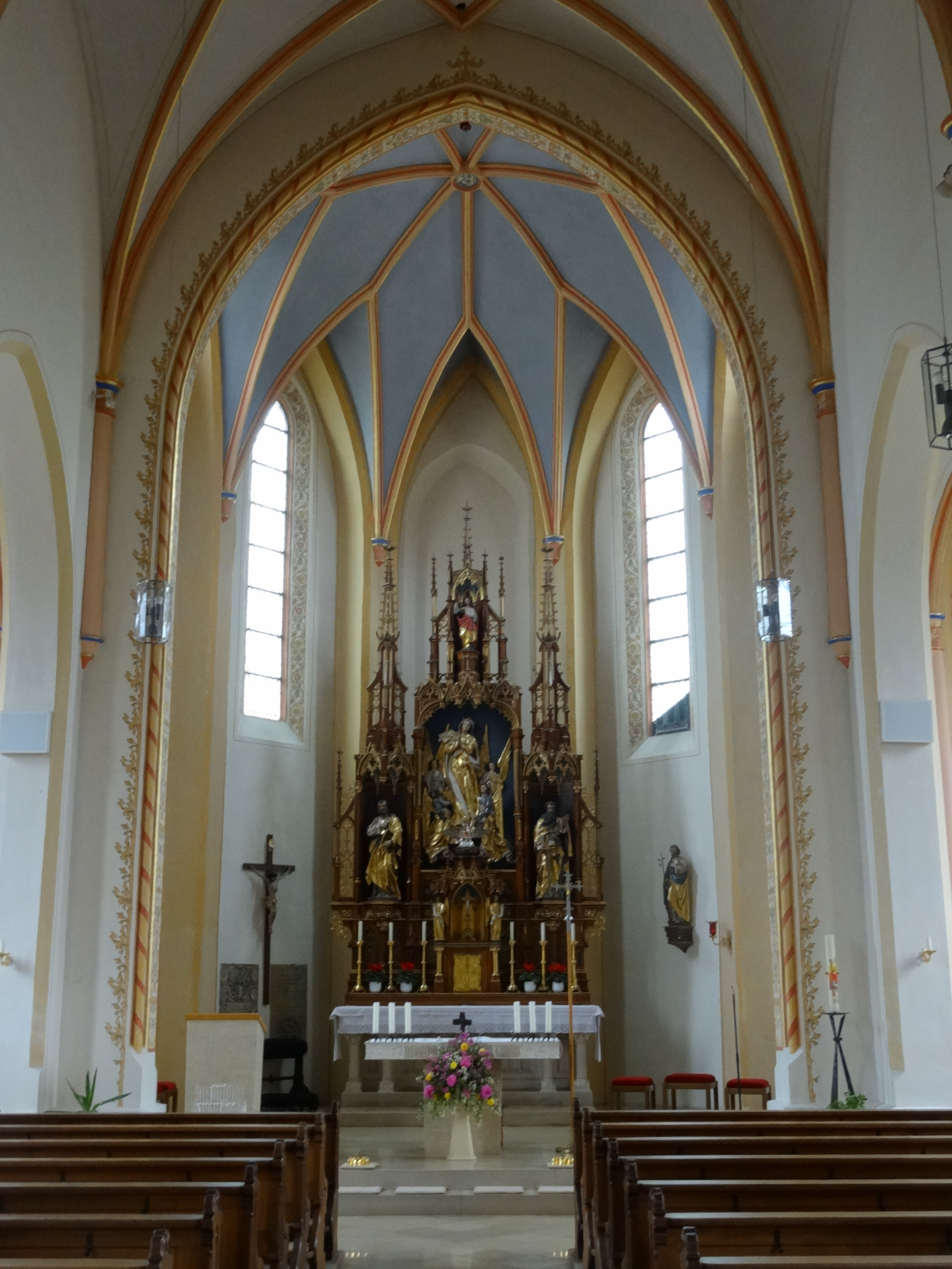 Innenansicht der Pfarrkirche Mariä Himmelfahrt in Bonbruck (Gde. Bodenkirchen, Lkr. Landshut, Bayern)